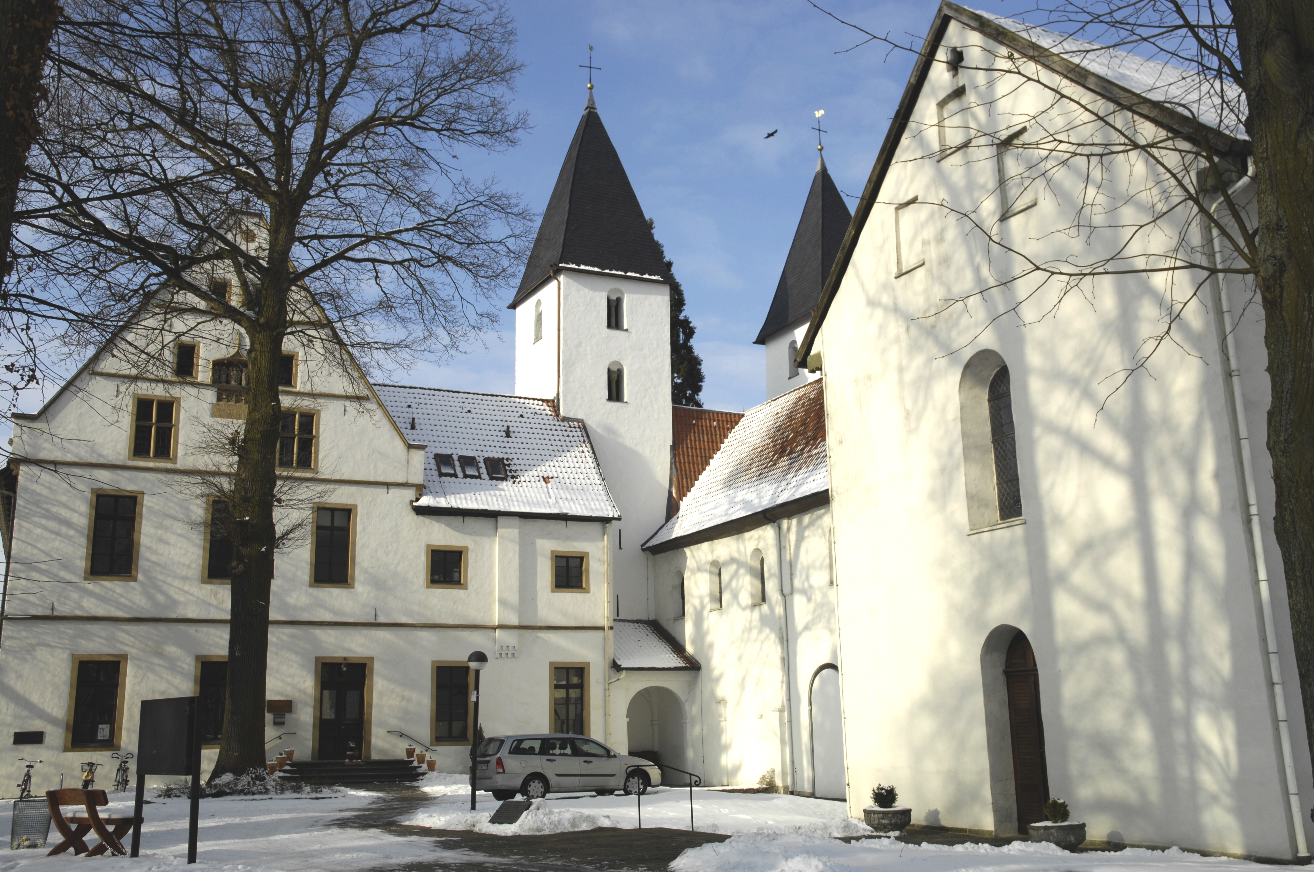 Stift Cappel, Nähe Lippstadt